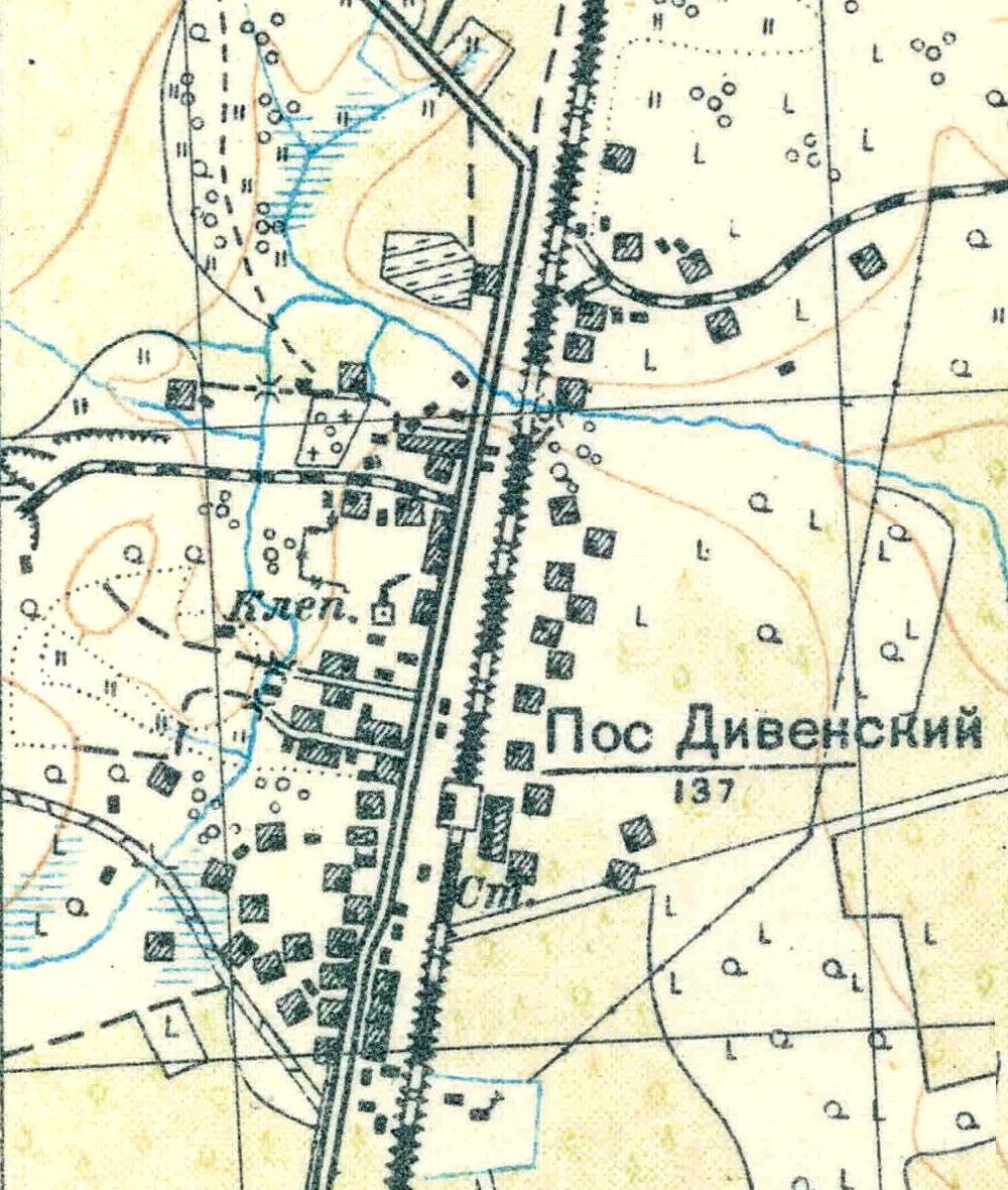 Топографическая карта Ленинградской области, квадрат О-36-25-А-в (Пос. Дивенский), посёлок Дивенский